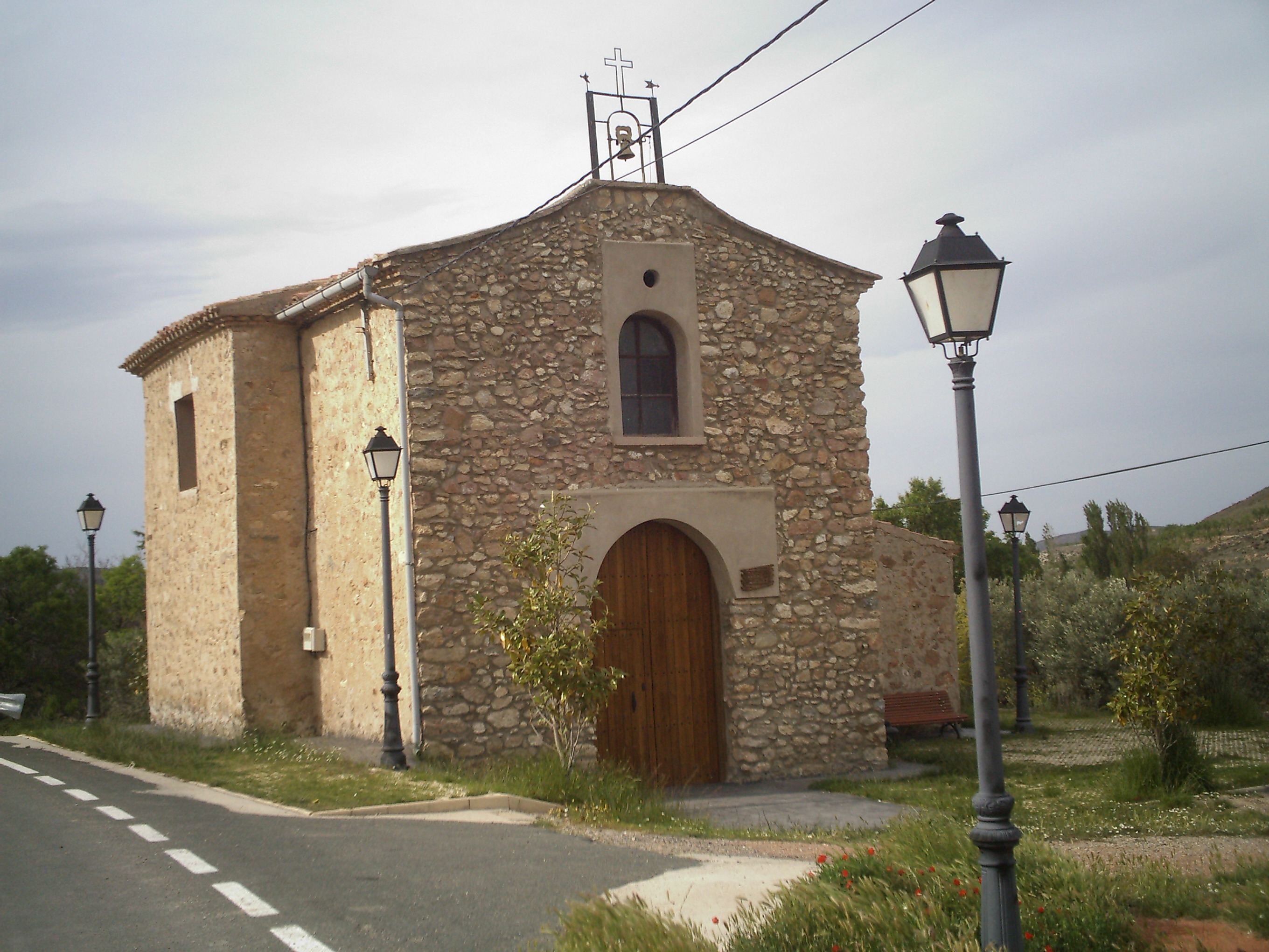 Valdegutur, La Rioja (España)